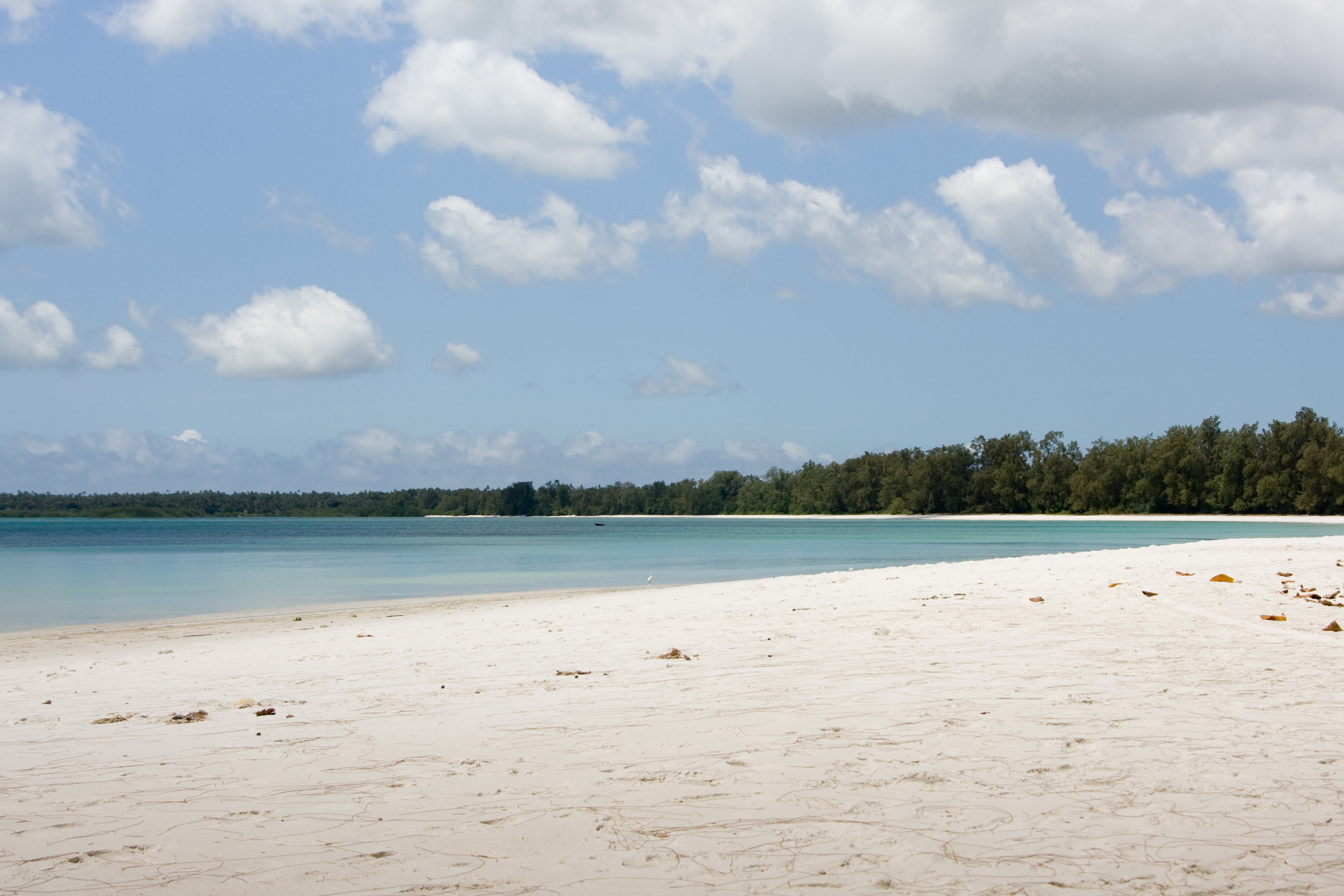 Pemba Island - Vumawimbi beach